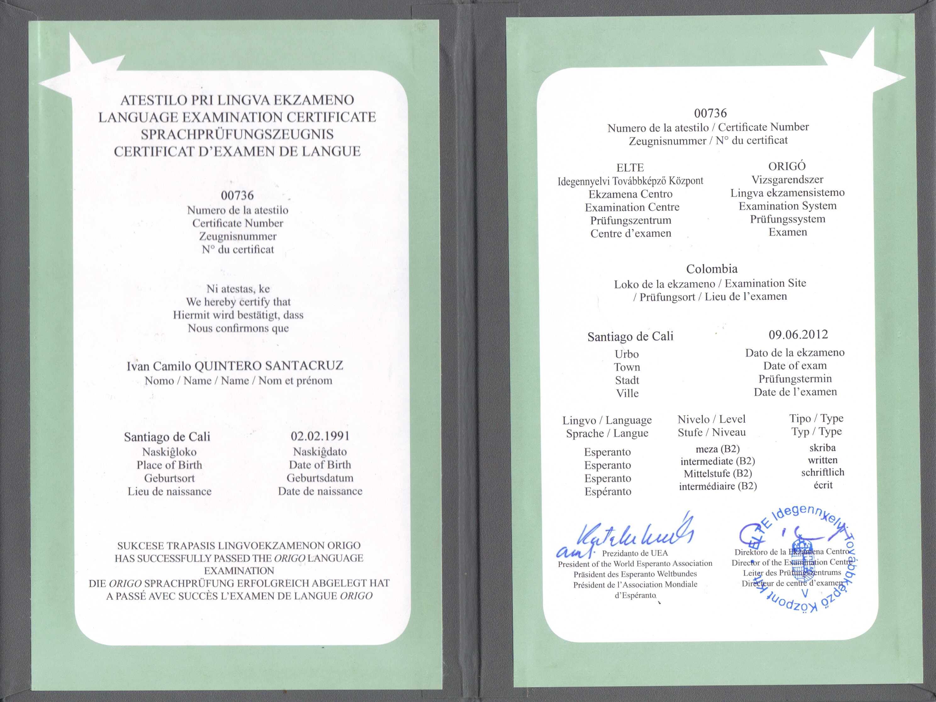 Certificado de éxito en un examen de Esperanto bajo el marco común europeo de referencia para las lenguas. Realizado el 6 de noviembre de 2012 en la "Tutmonda skriba sesio" (Sesión mundial escrita)